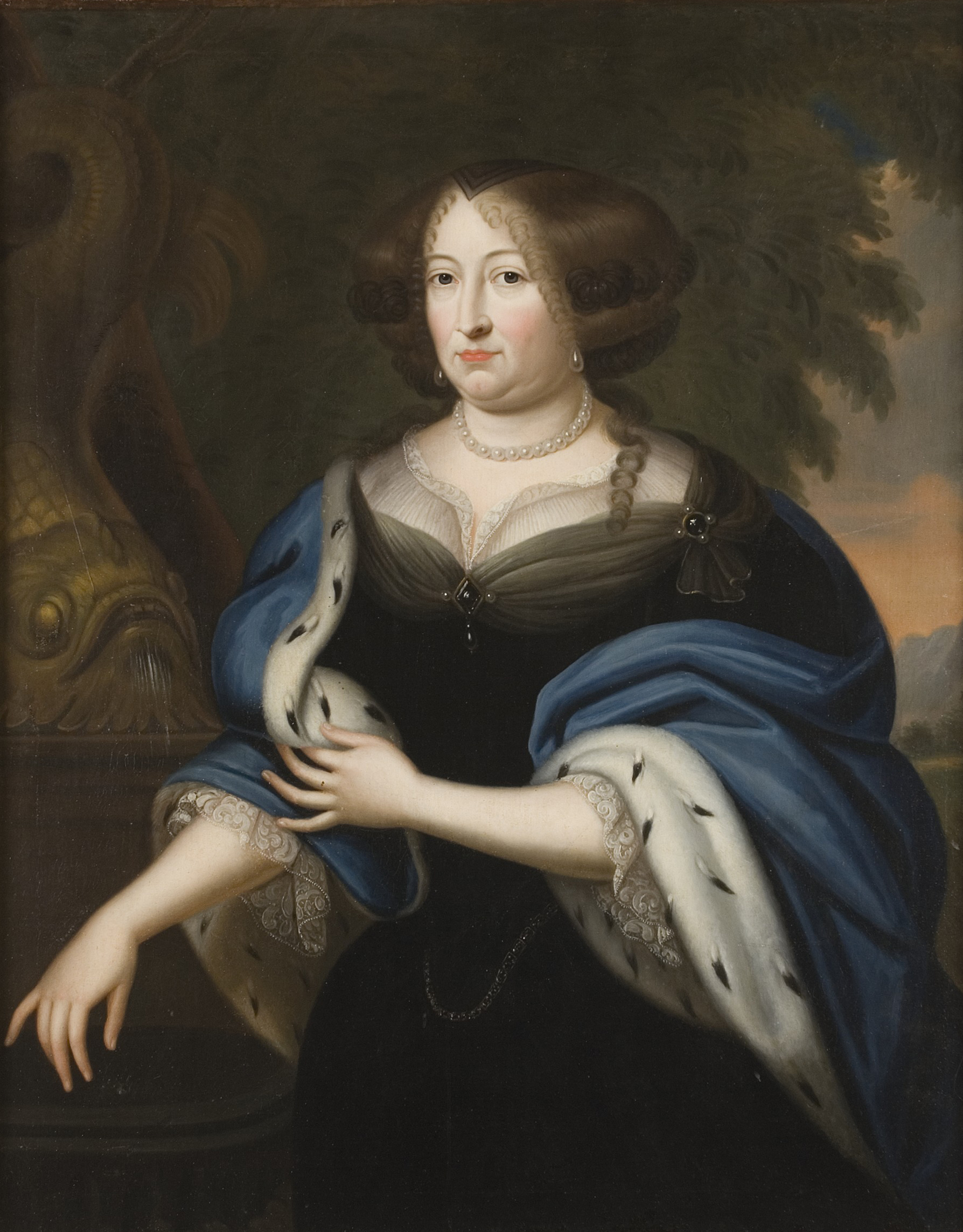 Hedvig Sofia de Brandemburgo (1623-1683)